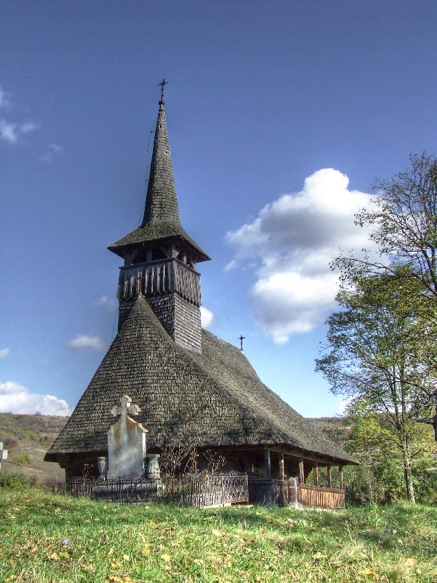 Biserica de lemn din Sântejude (Biserici de lemn din Cluj)